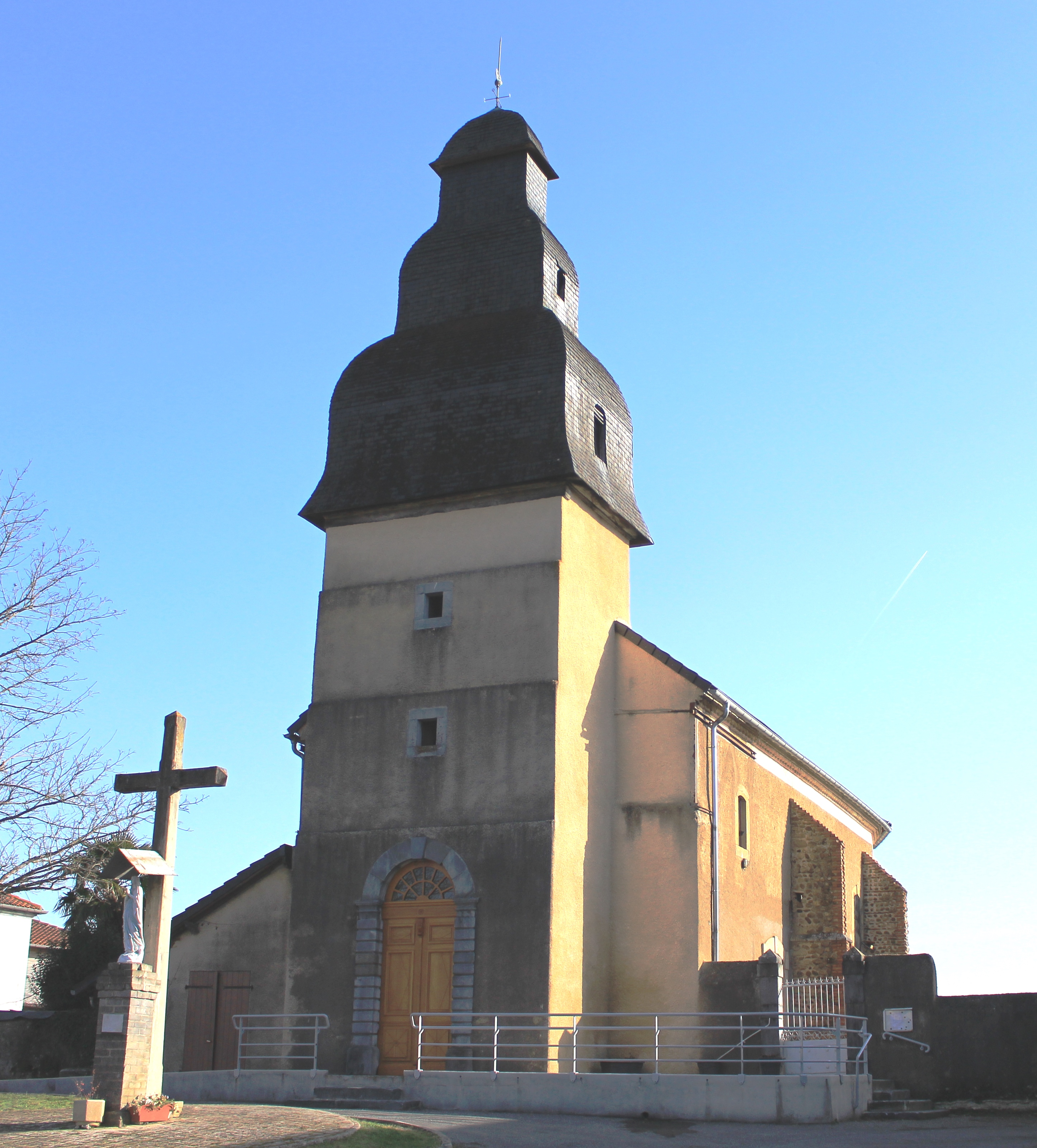 Église Saint-Hippolyte de Marseillan (Hautes-Pyrénées)